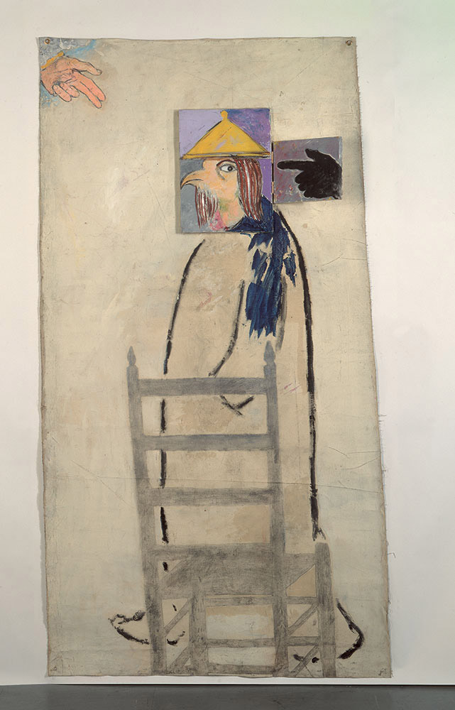 היהודי הנודד (1983), אקריליק ועיפרון עד בד רפוי ועל דיפטיך, 108x212 ס״מ